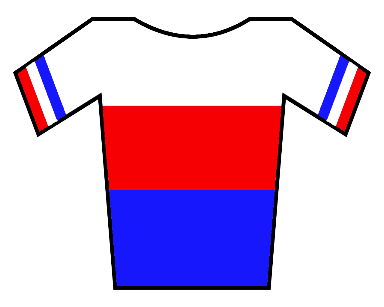 MAillot de Chequia